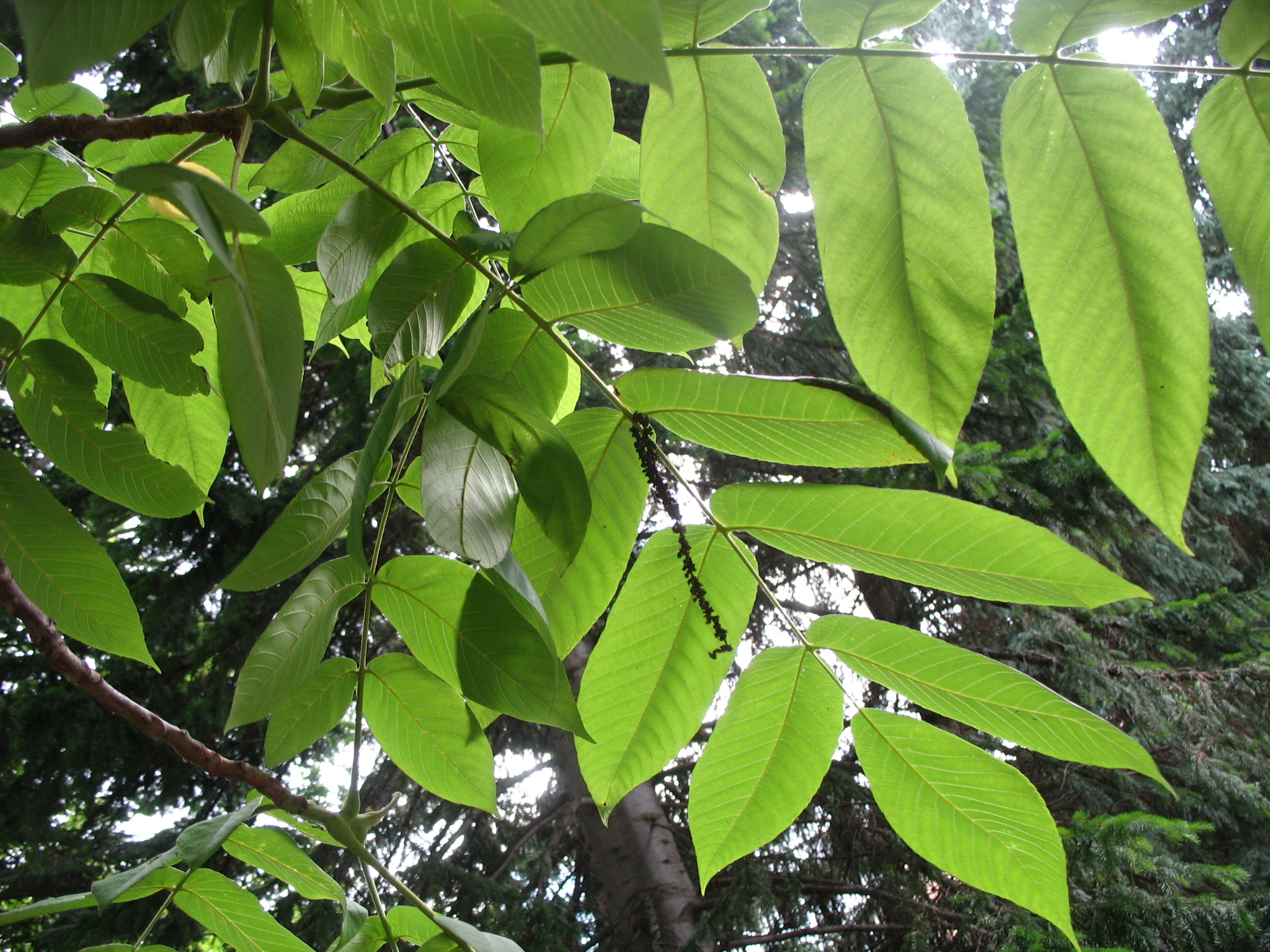 Алтай, курорт Белокуриха